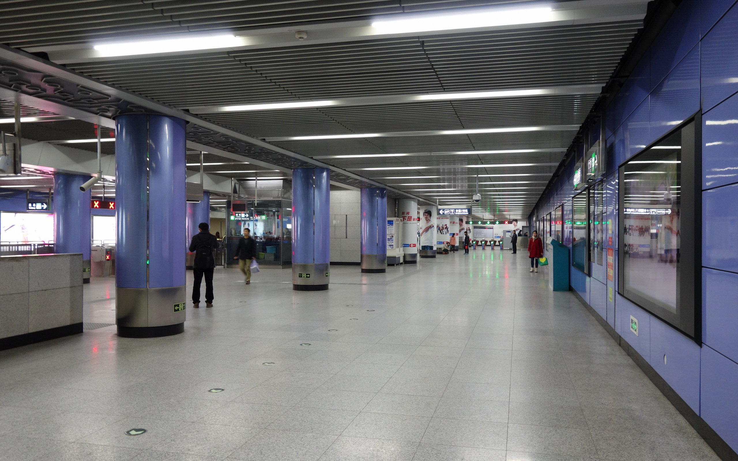 北京地铁4号线中关村站站厅层